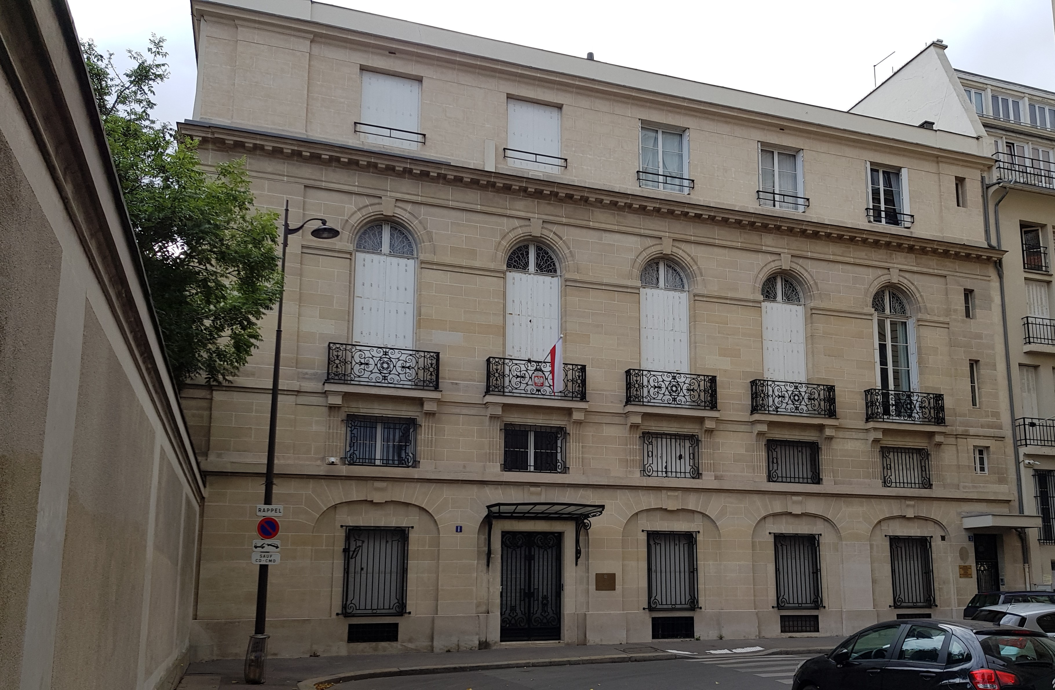 Ancien hôtel Seligmann, actuelle ambassade de Pologne, 1-3, rue de Talleyrand, Paris 7e.